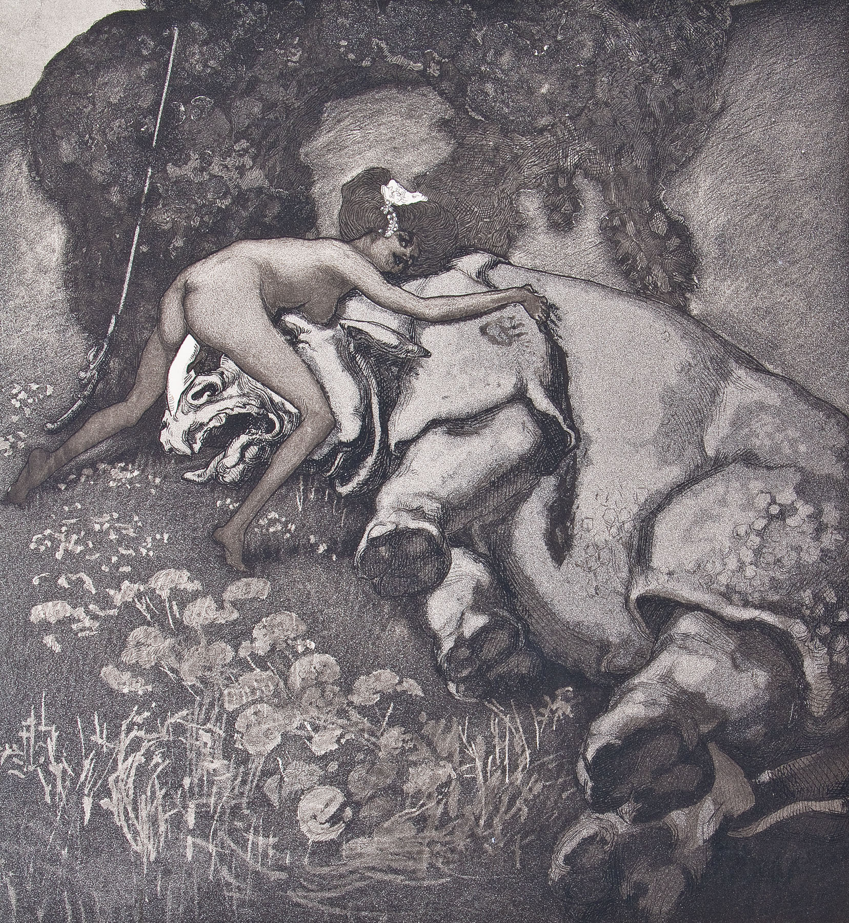 Die Nashornjägerin aus Die Bonbonnière. 1907. Aquatinta auf Velin. Ca. 24,5 x 22 cm (Plattenmaß)